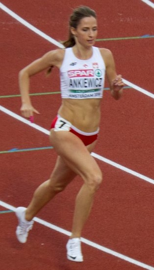 522 400mH nenah deconinck